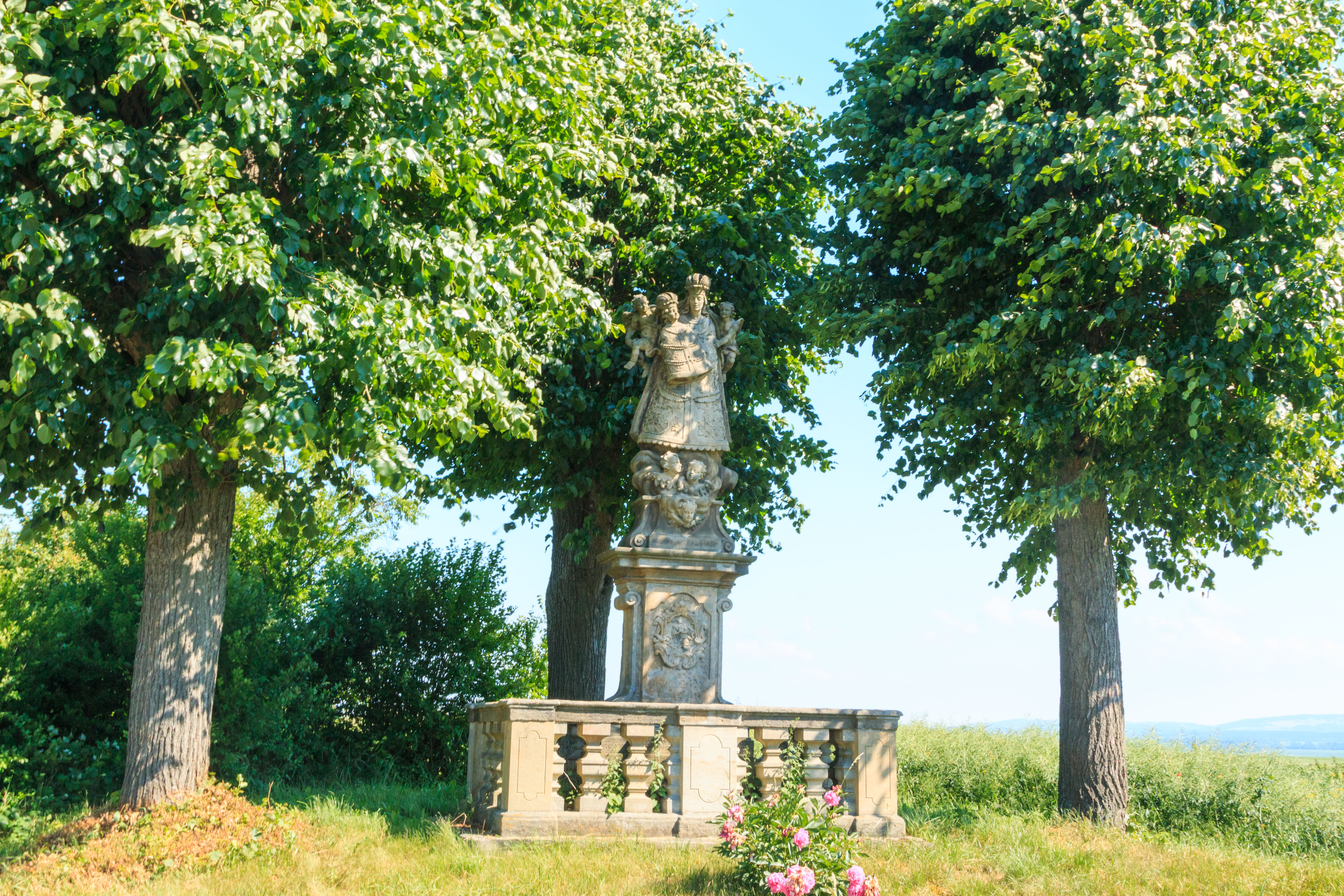 Socha Panny Marie Svatohorské, při silnici II/298 Opočno - Dobruška, Holoubkův kopec, pp. 545/3, Pulice. Project: Fotíme Česko.